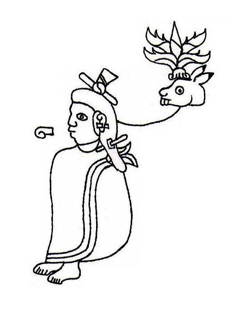 Posible representación de Mexih-Chalchiuhtlatonac, basado en el sistema de escritura mexica donde se combinan los elementos me(tl)=maguey y zih(tli)=liebre. Existe una evolución común de /z/ a /x/ quedando el nombre como Mexi(h).